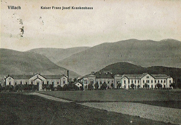 LKH Villach